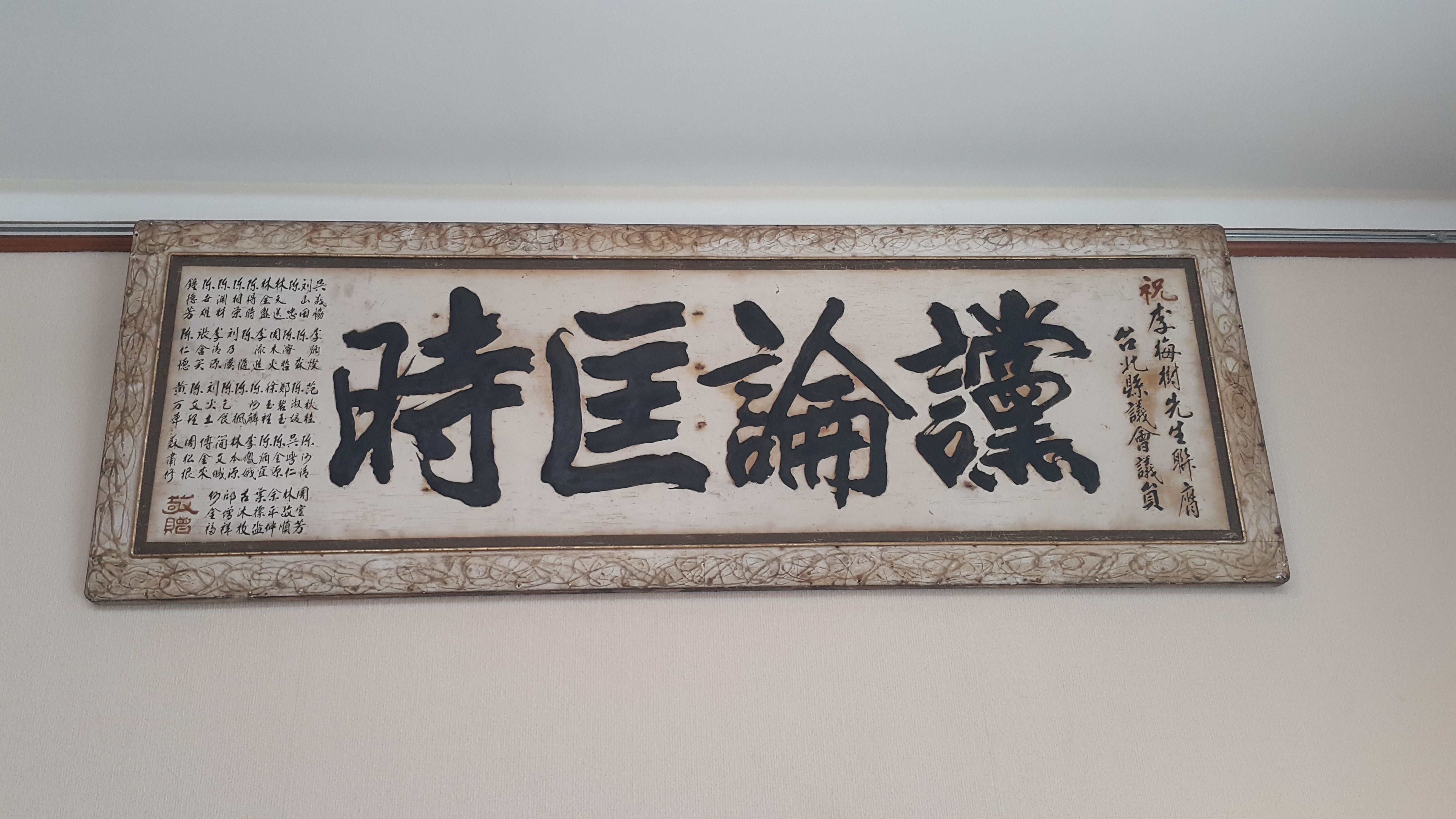 中文（台灣）: 李梅樹紀念館匾額